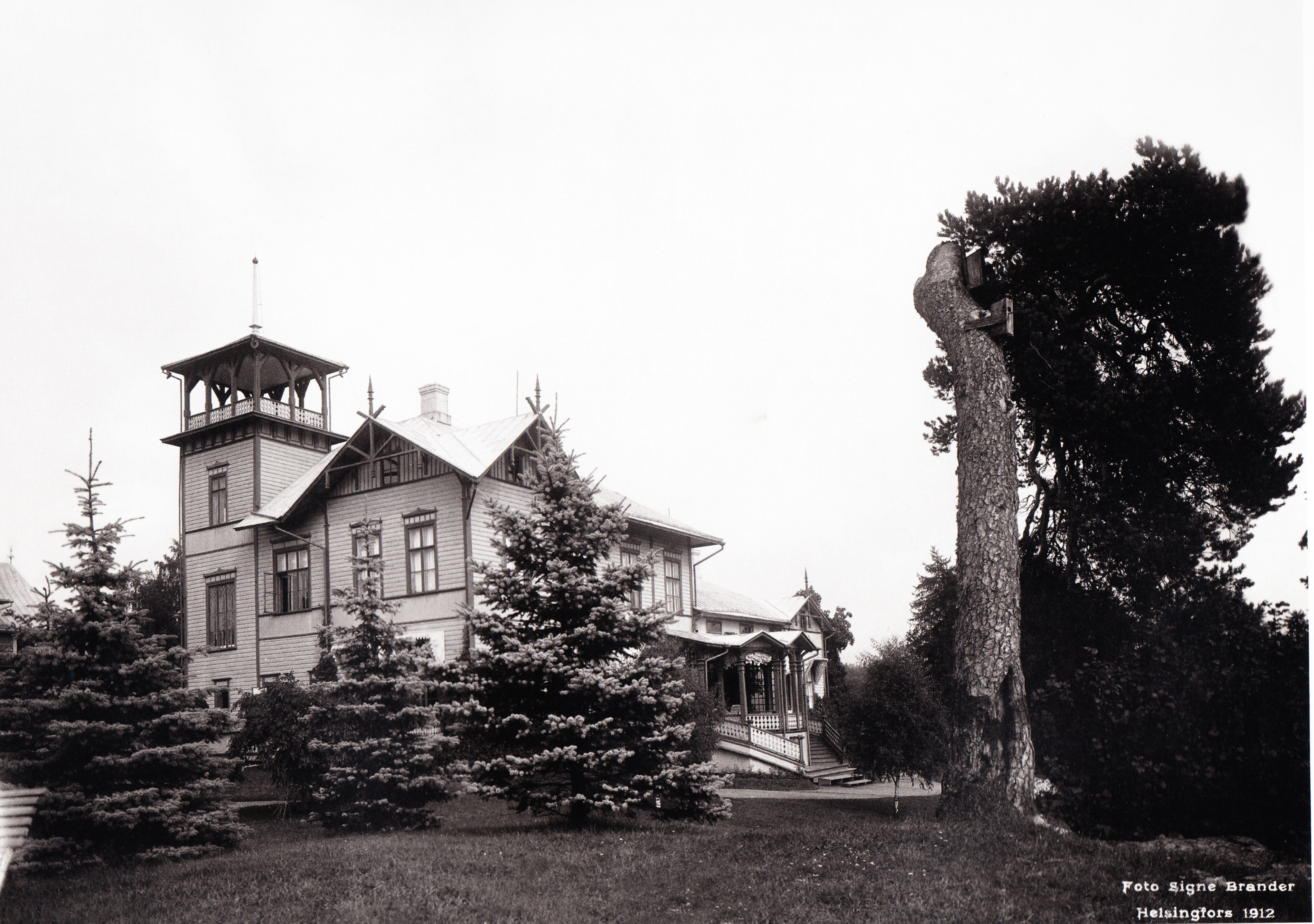 Ahvenkosken kartano